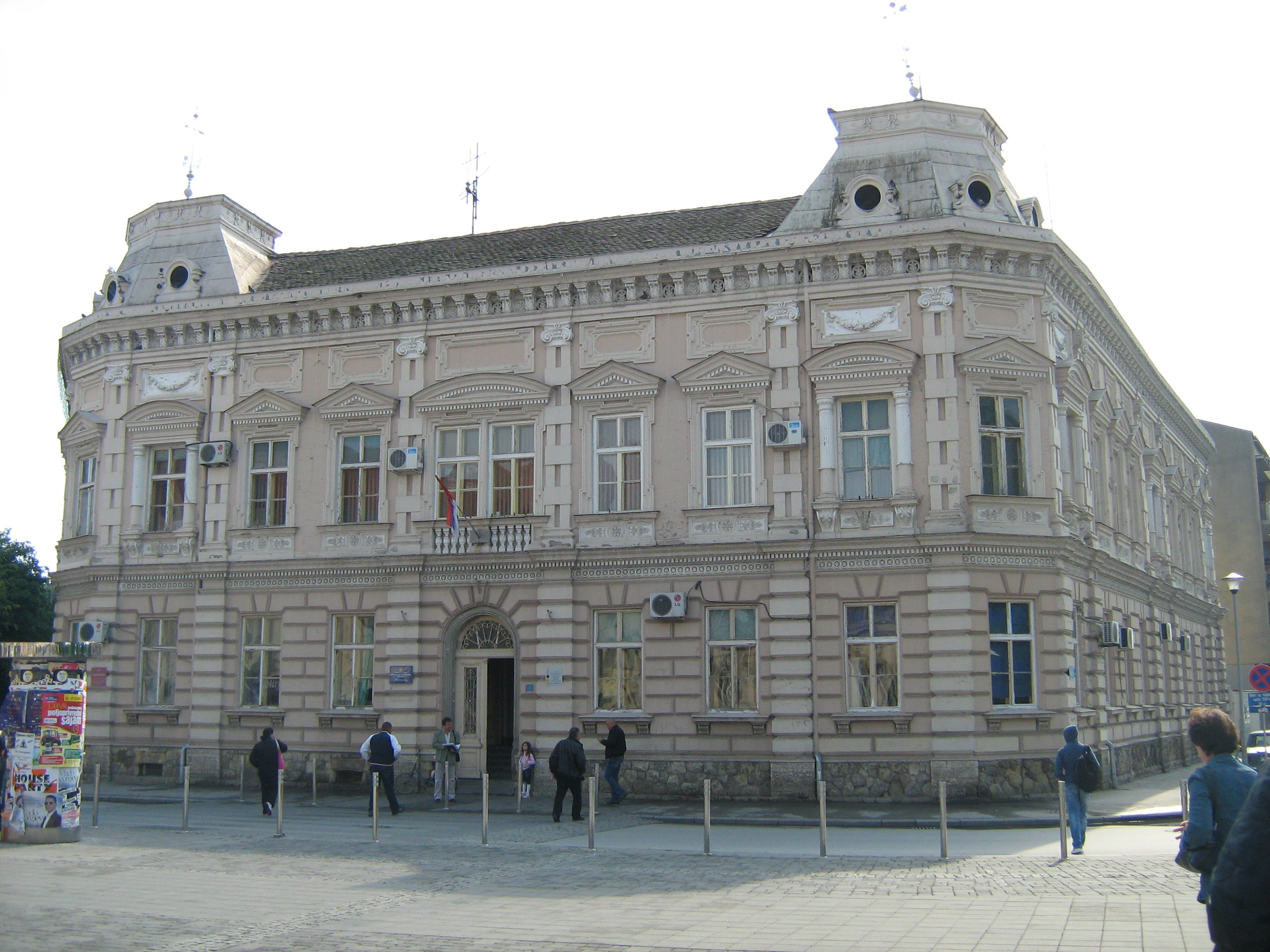 Зграда полиције у Сремској Митровици